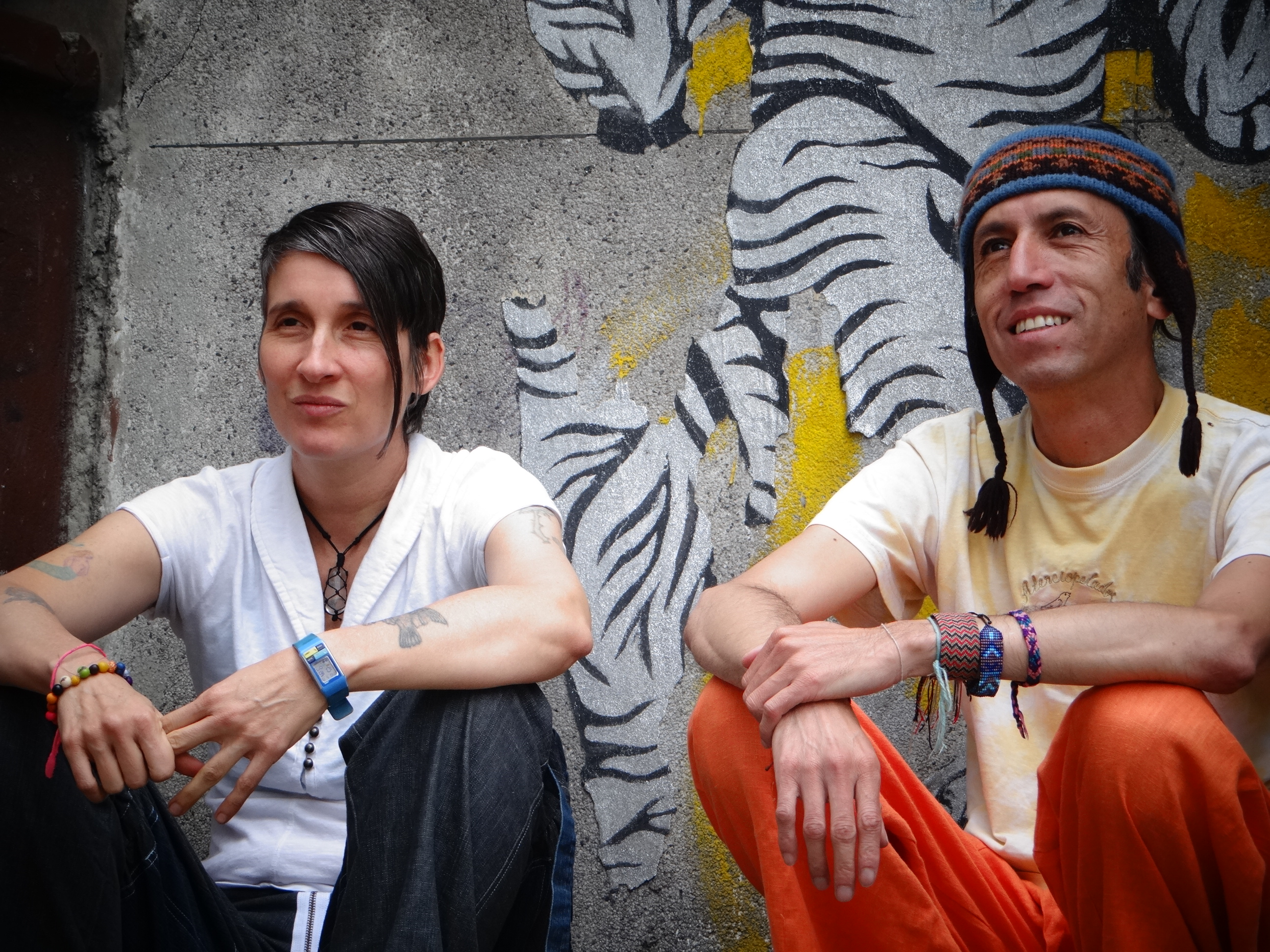 Foto: Carolina Cataño